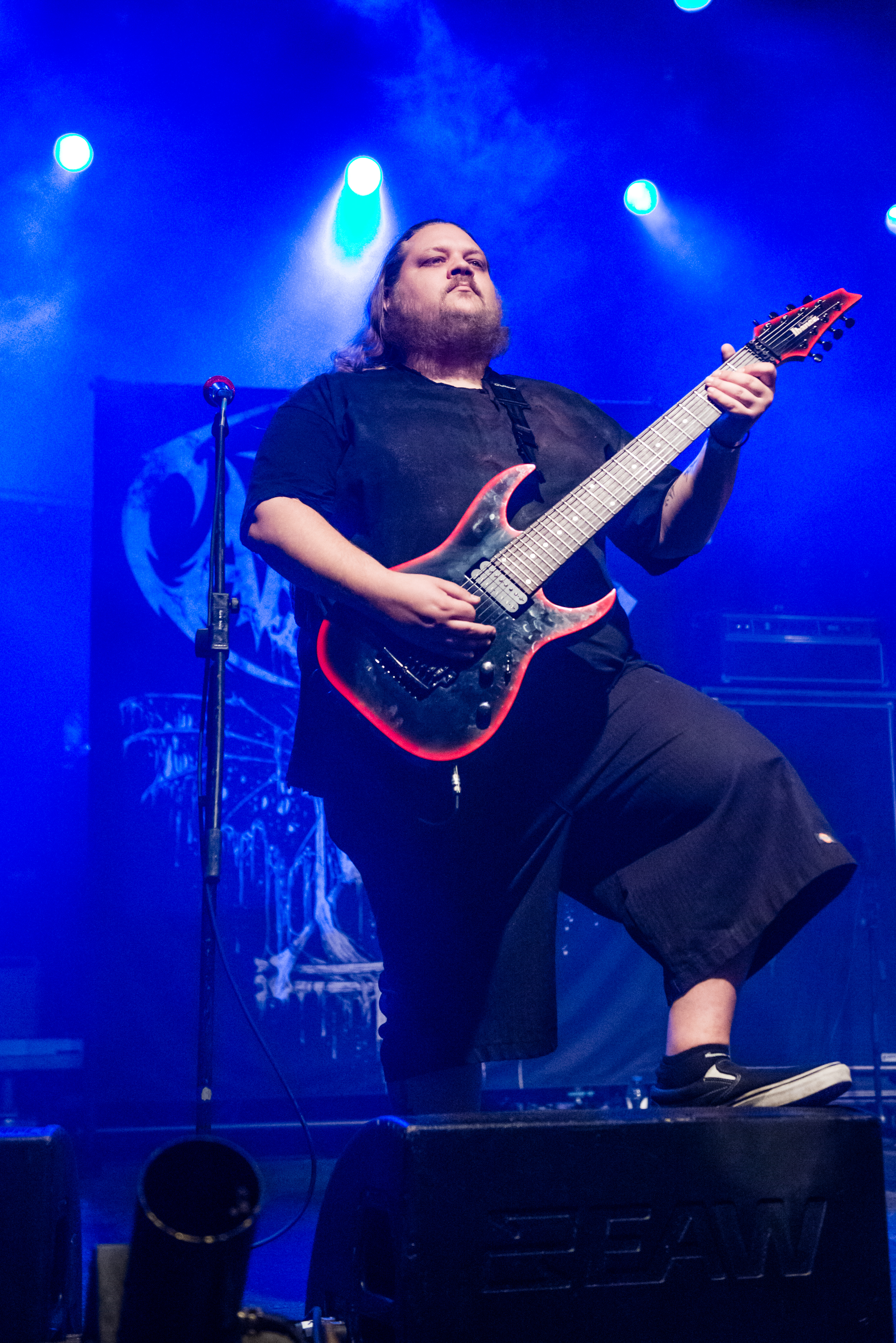 'Impericon Festival 2015; Oberhausen Turbinenhalle': 'Carnifex'